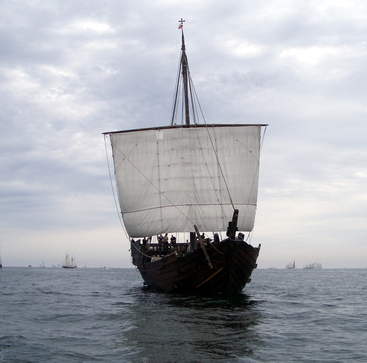 Segelschiff (Kogge) Kieler Hansekogge auf der Kieler Woche 2007. Nachbau der bei Bremen 1962 aufgefundenen Bremer Kogge von 1380. Fertigstellung des Nachbaus: 1991 (Frontansicht).